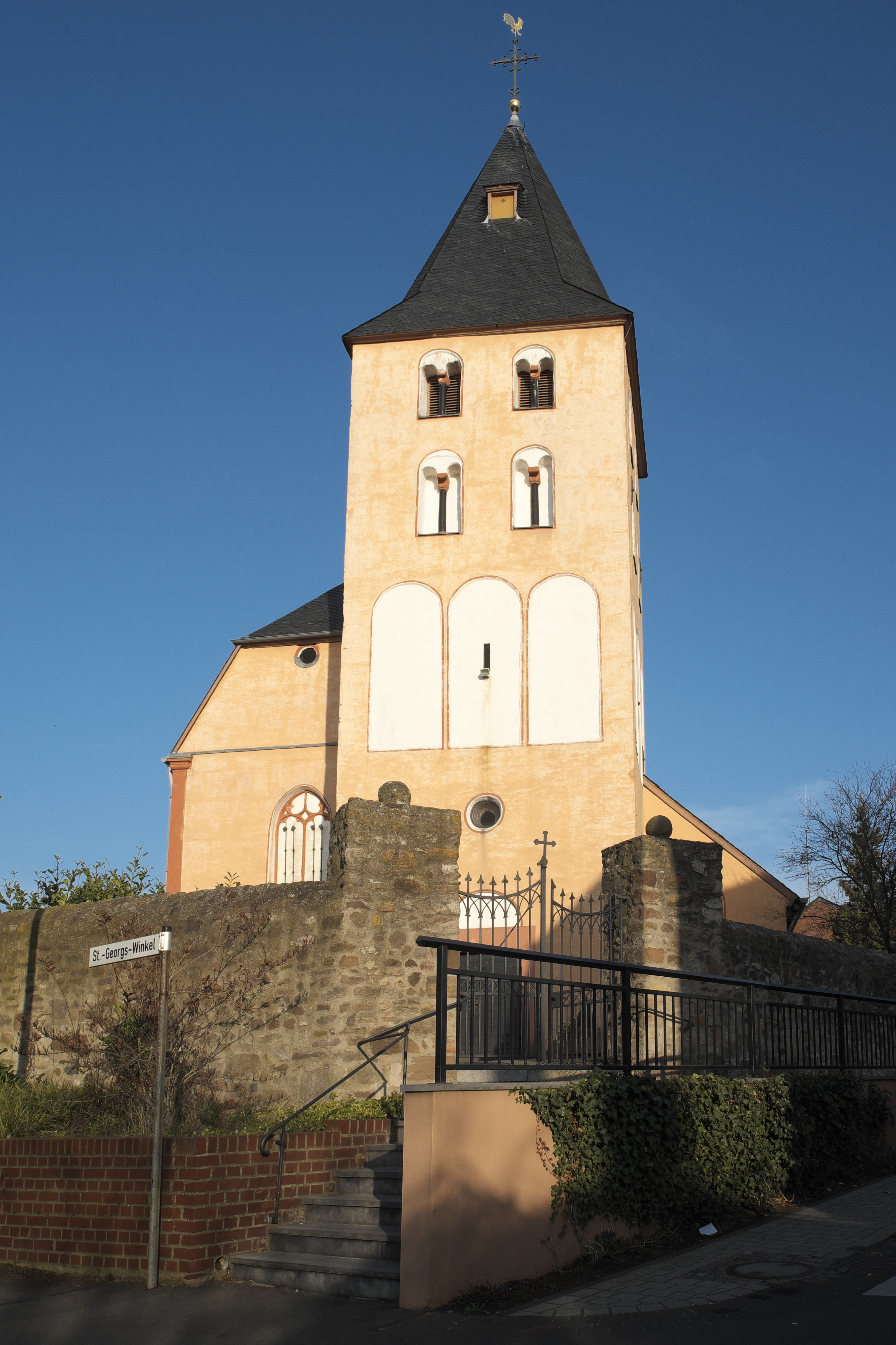 Katholische Pfarrkirche St. Georg in Frauenberg im Kreis Euskirchen in Nordrhein-Westfalen (Deutschland)